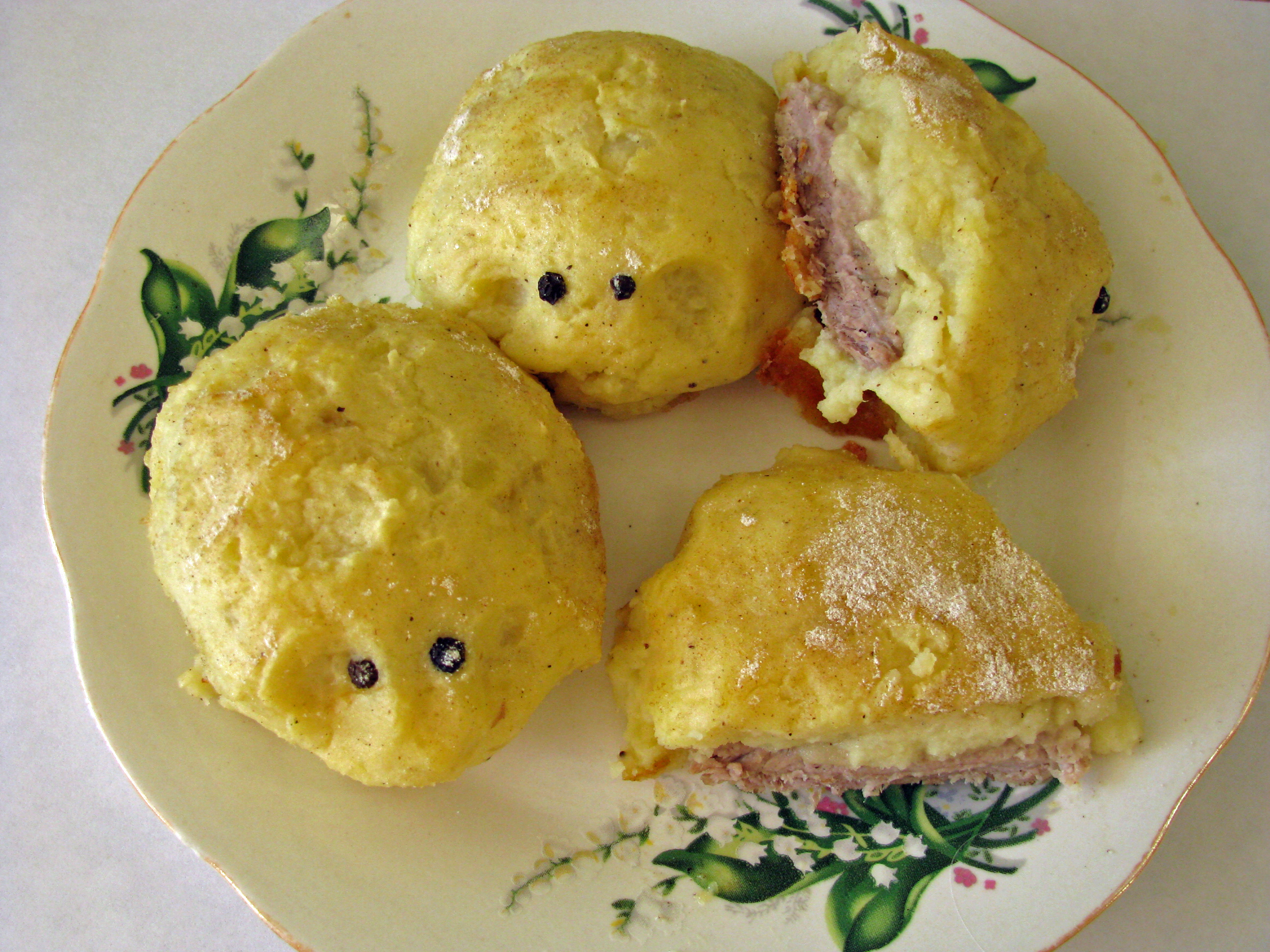 Sertéshús szeletek borgonyabundában